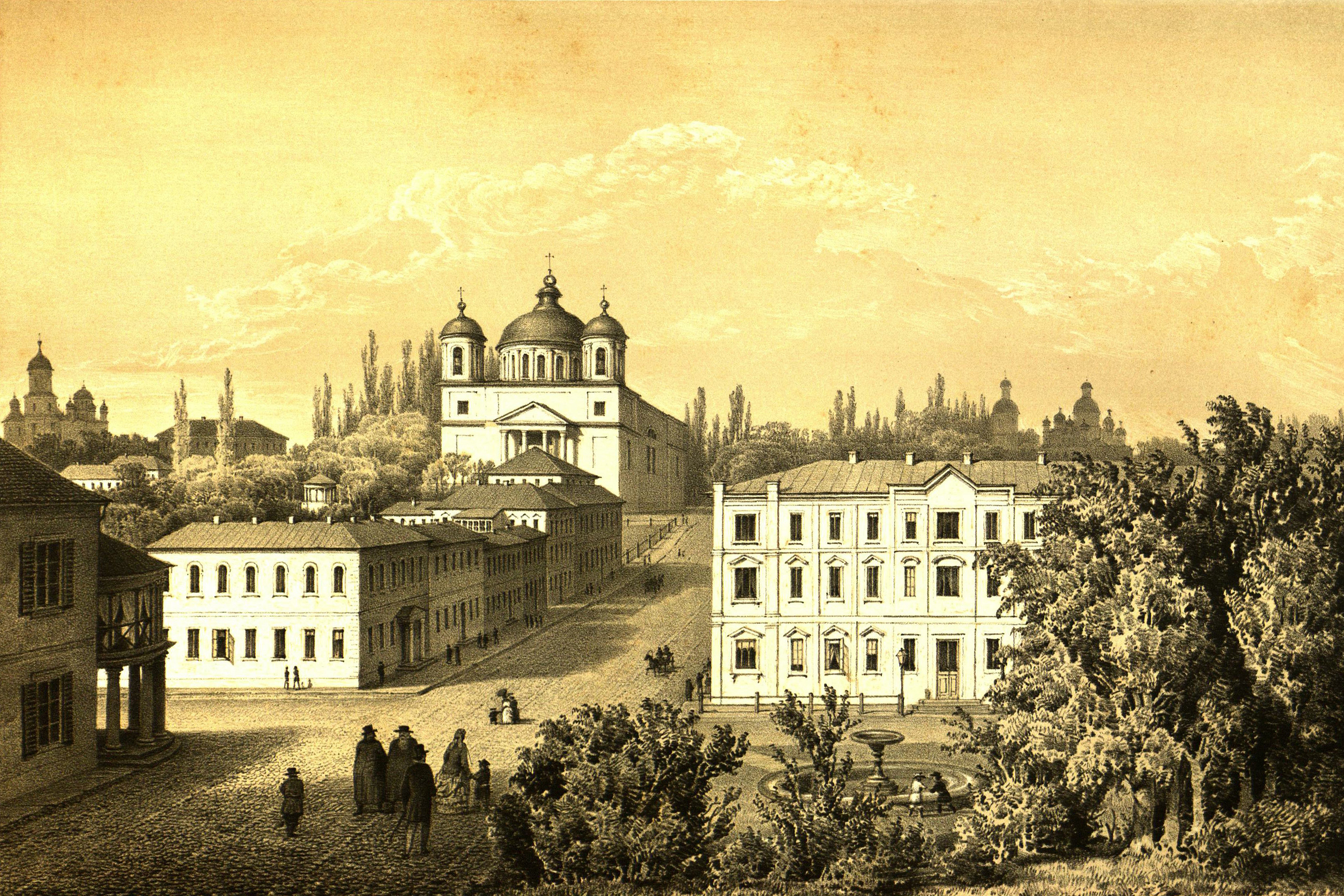 Наполеон Орда. Театральна площа